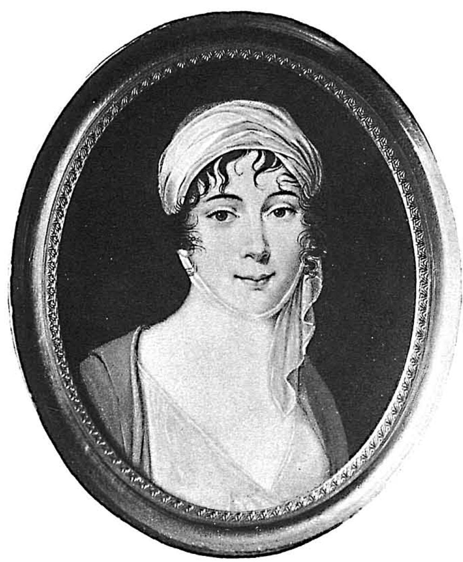 Елизавета Никитична Всеволжская (177.-1812), побочная дочь богача Н.А.Бекетова, жена Всеволода Александровича Всеволжского (1769-1836).